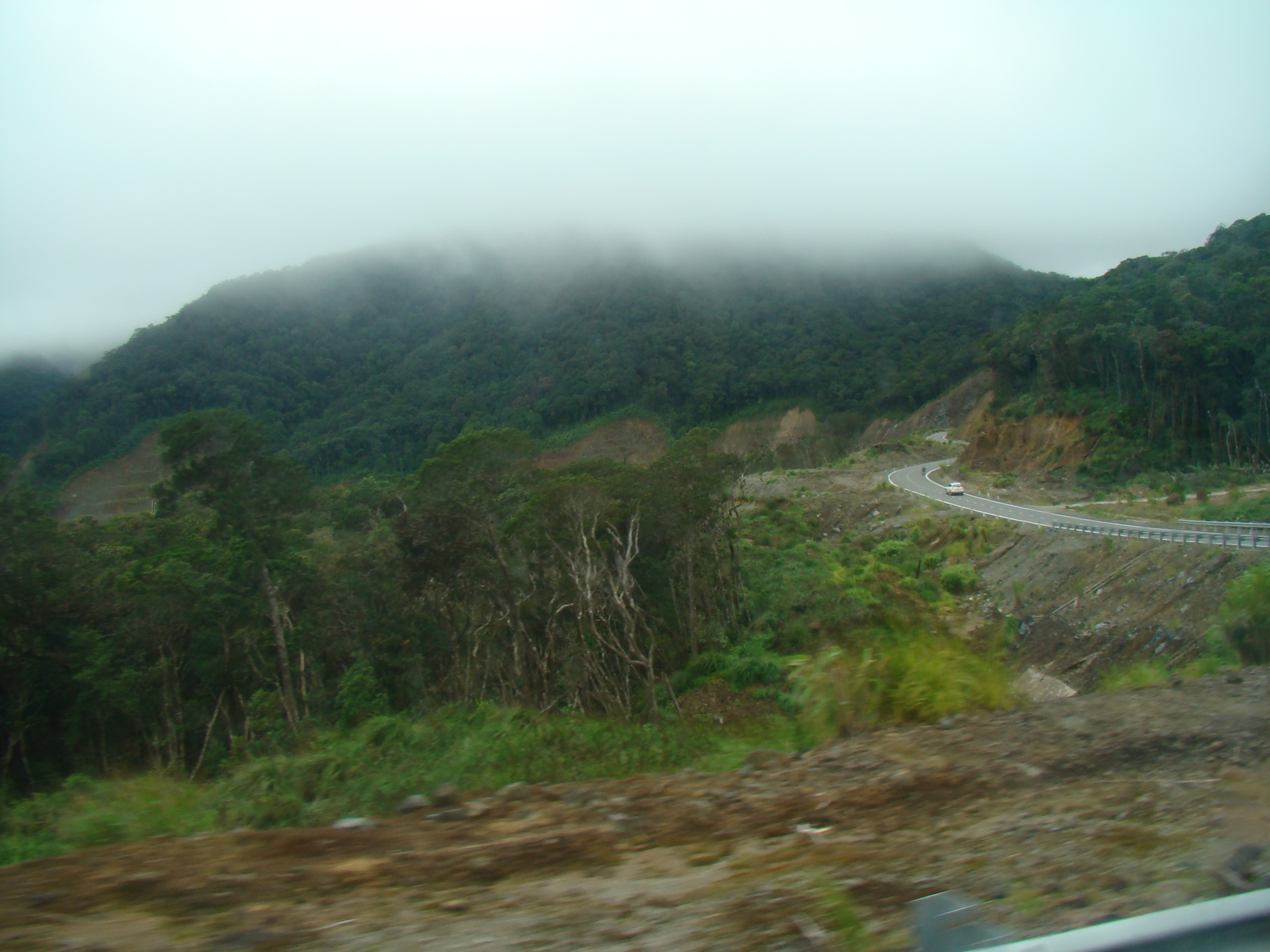 Cảnh đèo trên đường 723